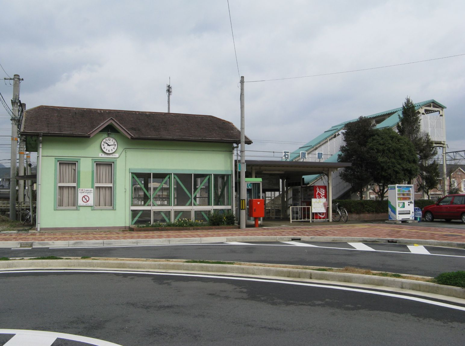 山陰本線 石原駅